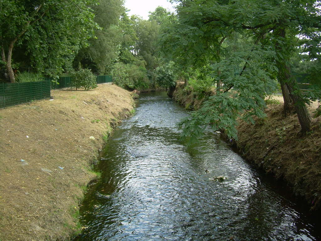 Autore: Cristian1989 Foto: Fiume Seveso nei pressi del comune di Bresso (MI)